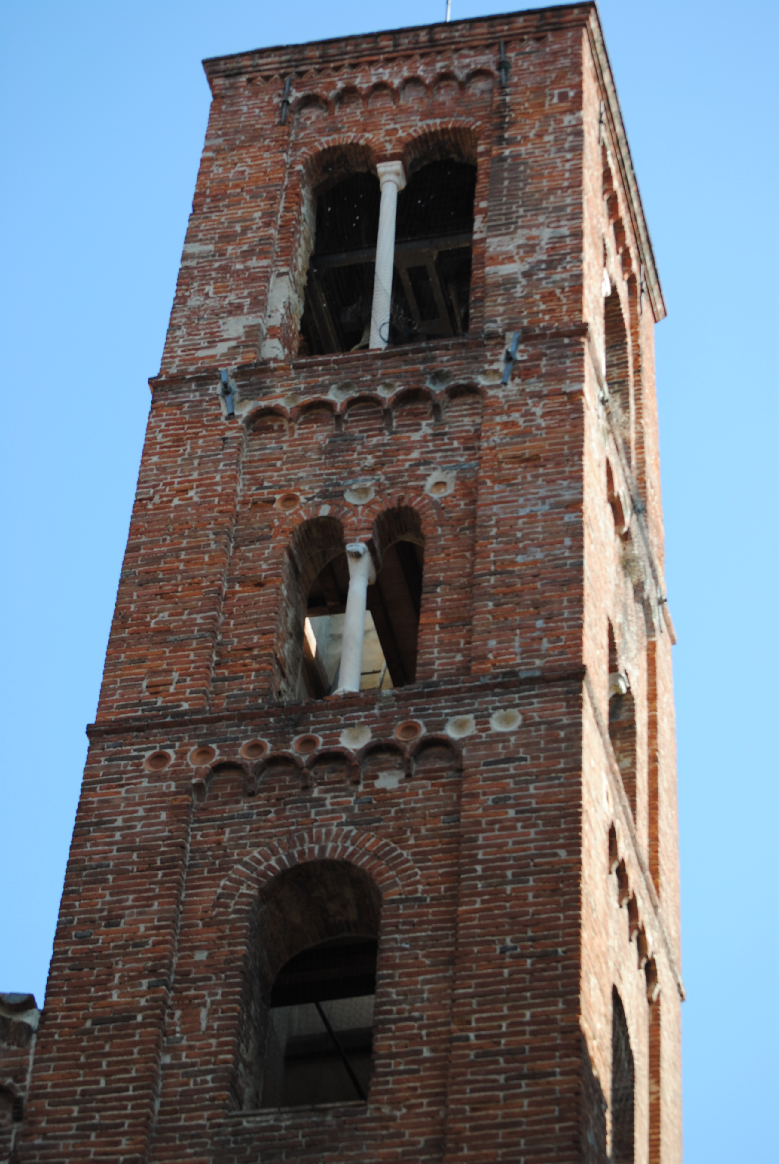 Campanile della chiesa di Santa Cecilia (Pisa) decorato con bacini ceramici collocati sopra gli archetti ciechi.